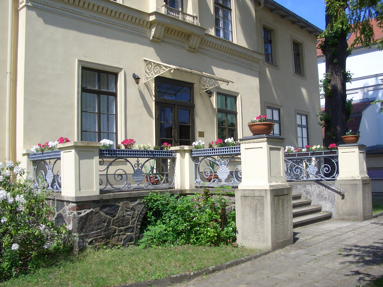 Corpshaus Silesia Breslau, Gubener Straße 15a, Frankfurt (Oder), Eingang